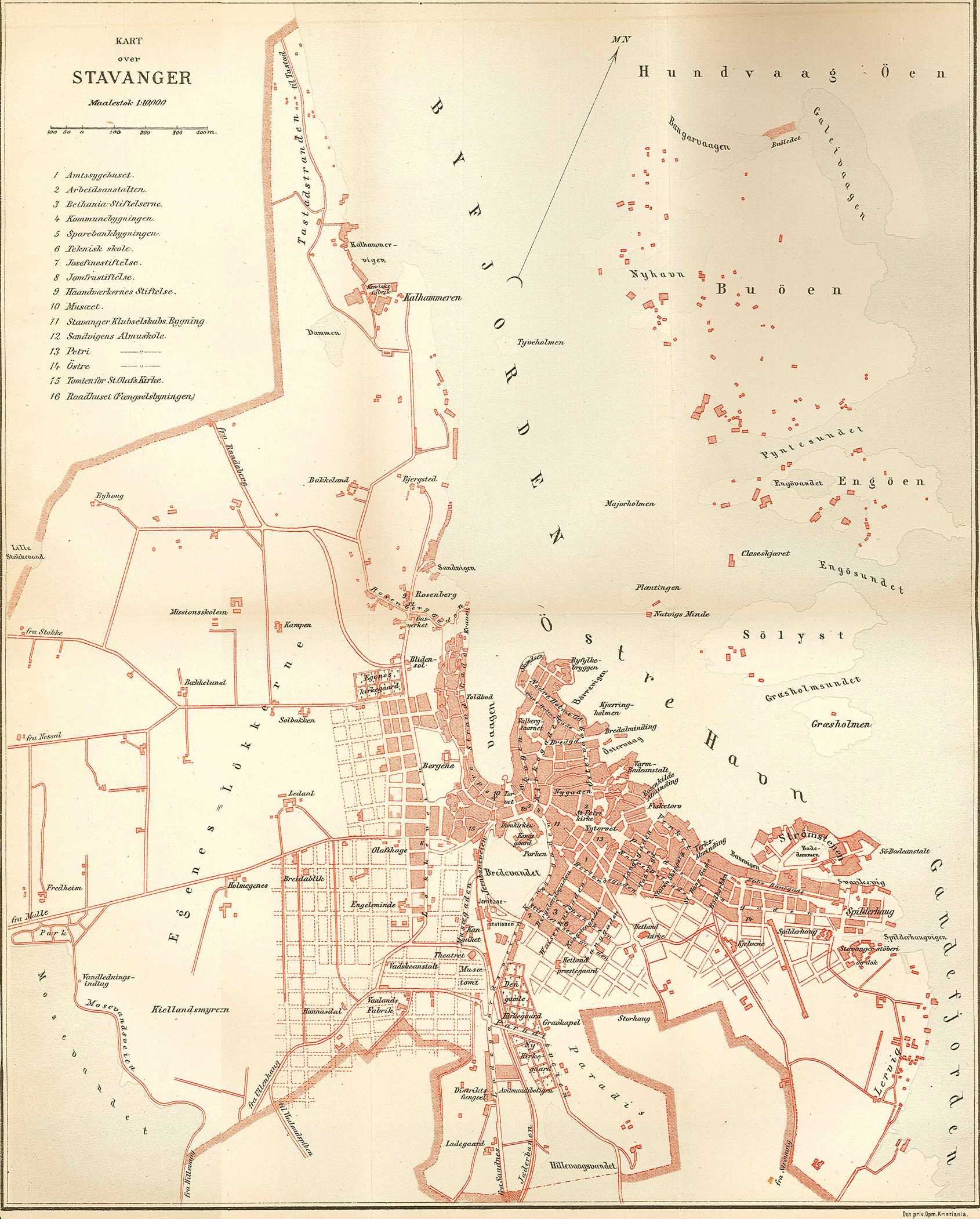 Kart over Stavanger, 1889